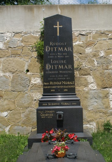 Rudolf Moralt-Heiligenstädter Friedhof